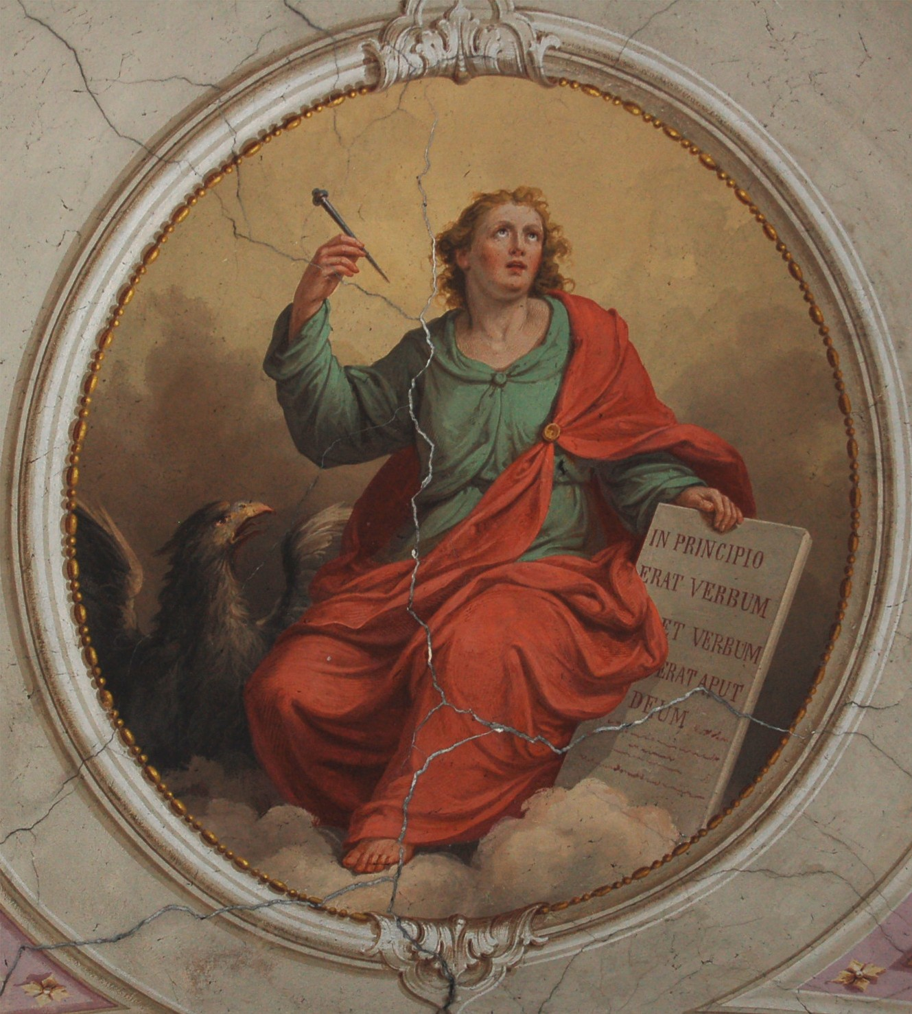 San Giovanni. Affresco di Luigi Tagliaferri. Chiesa di San Pietro Martire in Baruffini - Tirano - Sondrio